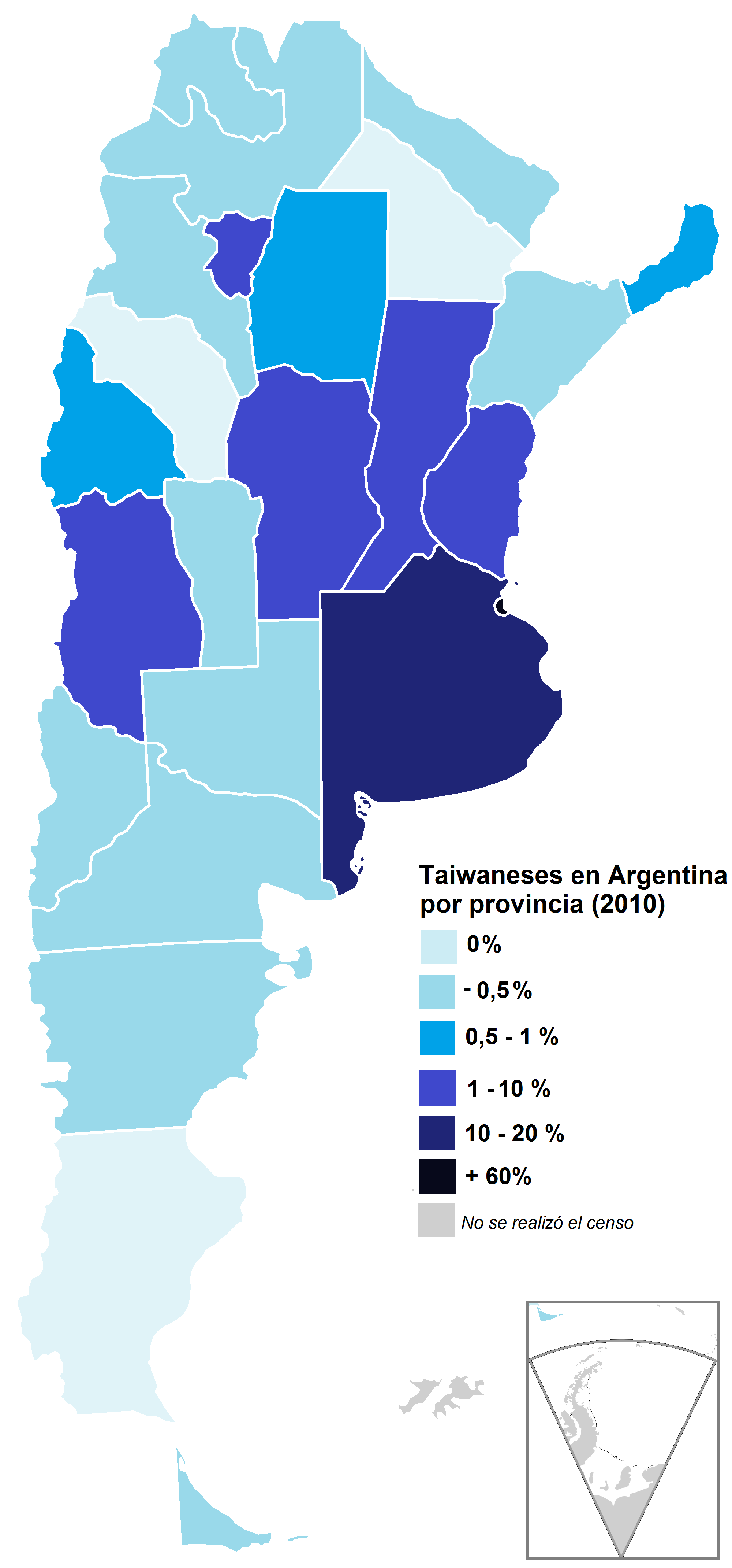 República Argentina por provincia. Población nacida en Taiwán (República de China), en porcentaje. Año 2010. Fuente: Censo 2010 - INDEC.